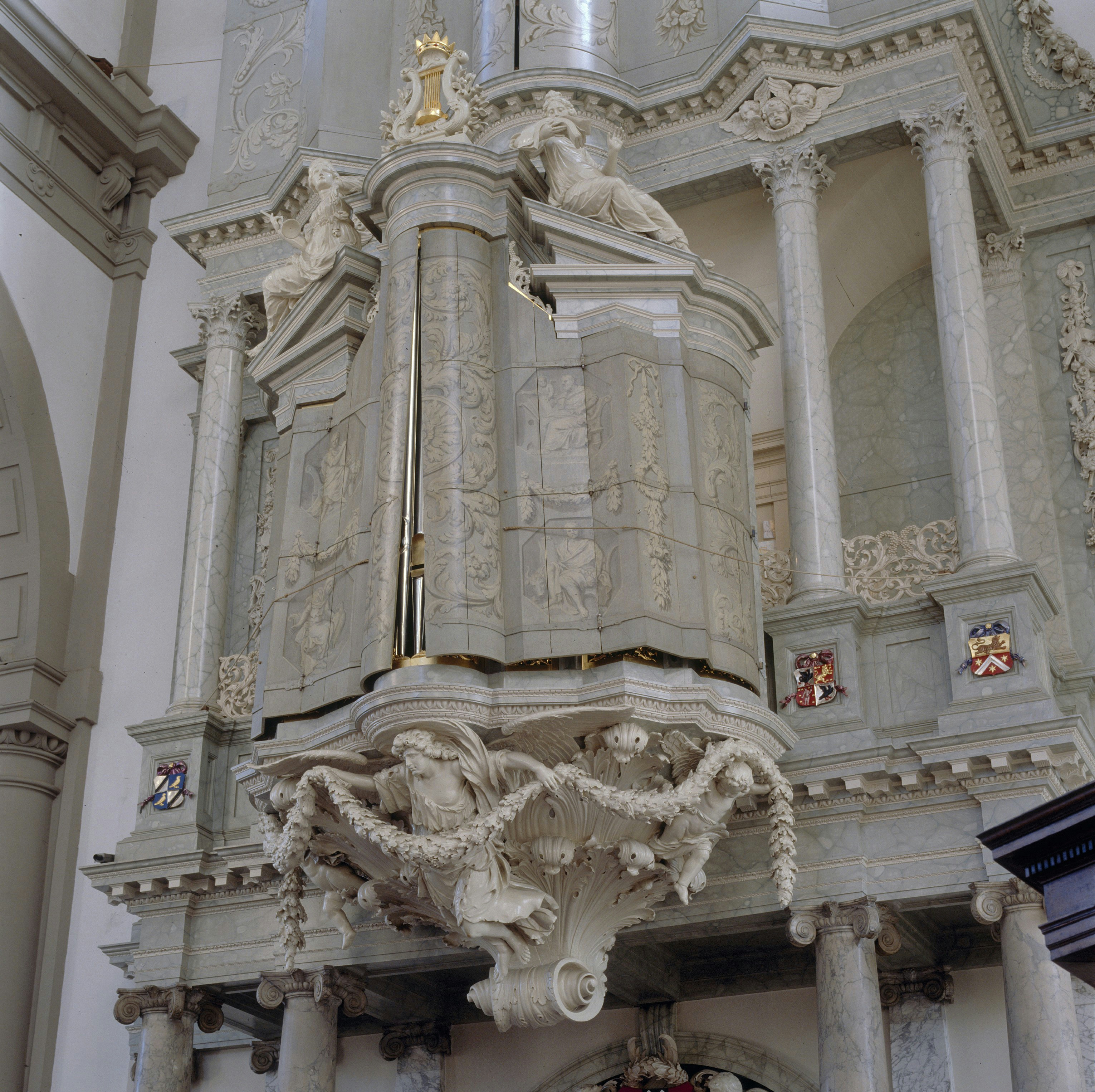 Westerkerk: Interieur, overzicht van door beschilderde luiken omsloten rugwerk van het orgel, orgelnummer 65 (opmerking: Gefotografeerd voor Het Historische Orgel in Nederland)